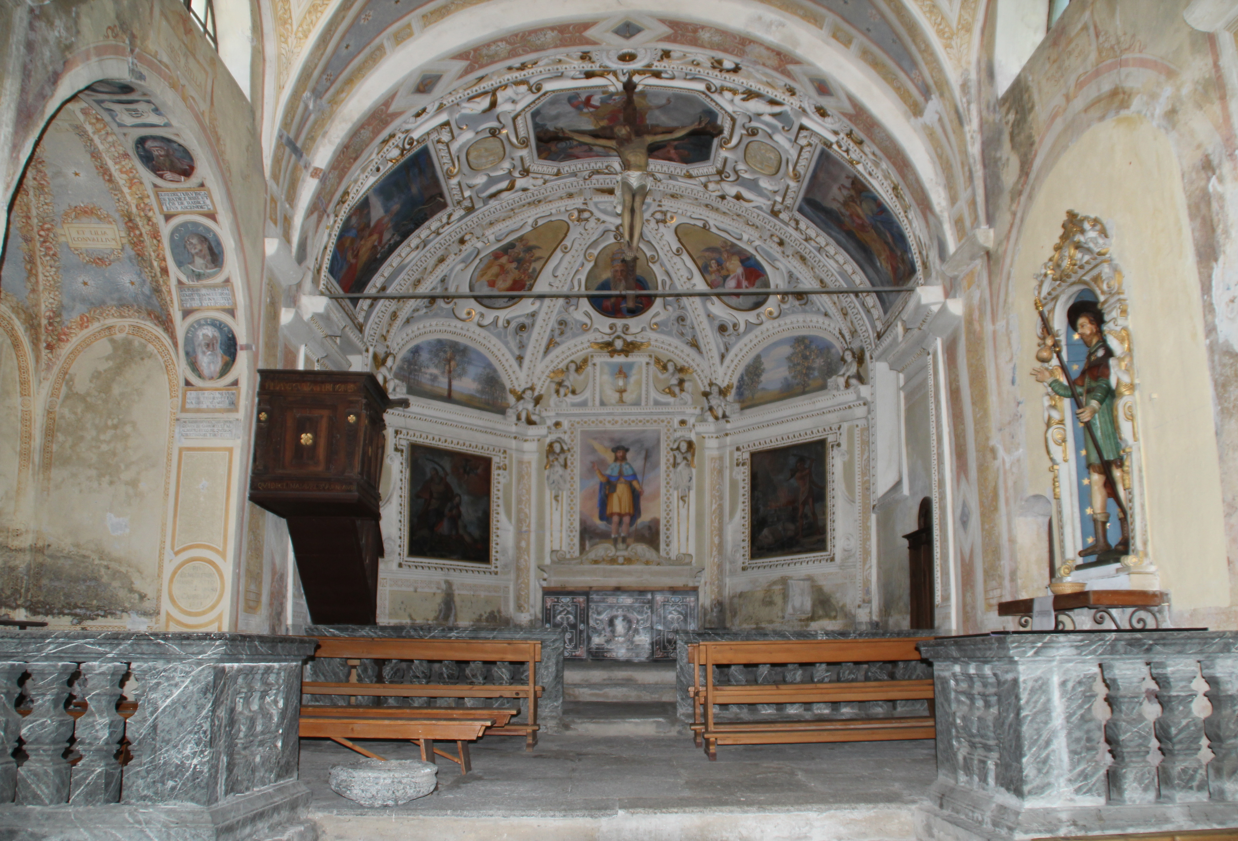 San Pellegrino (Giornico)